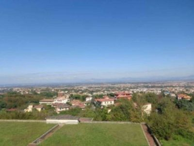 città giardino visto dall' alto